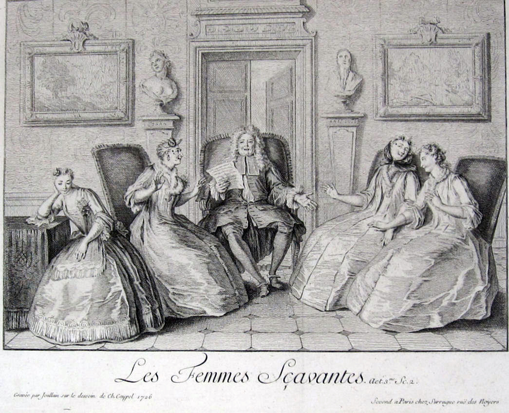 Illustration de la pièce de Molière.